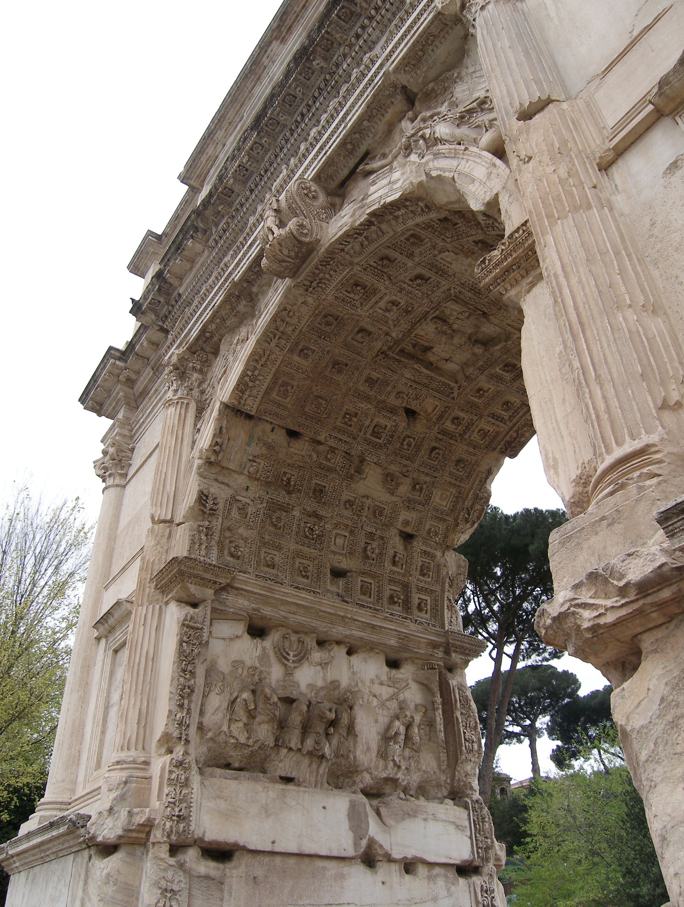 Rom, Titusbogen